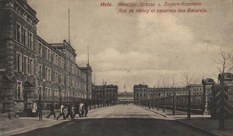 Metz Bayernkaserne rechts und Artilleriekaserne I & II links